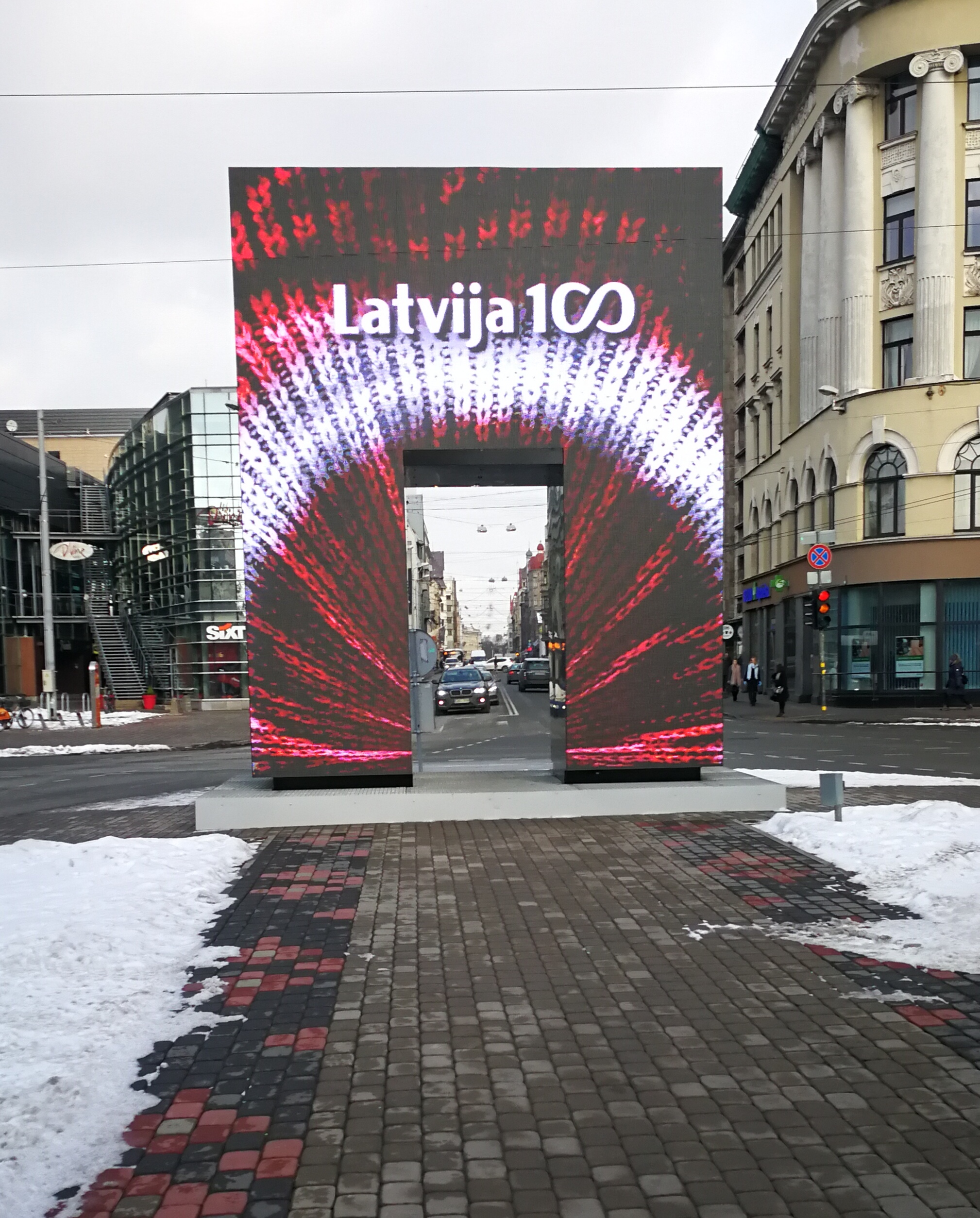 Instalācija Brīvības bulvārī, Rīgā, kas uzstādīta par godu Latvijas 100-gadei. 2018. gada februārī.